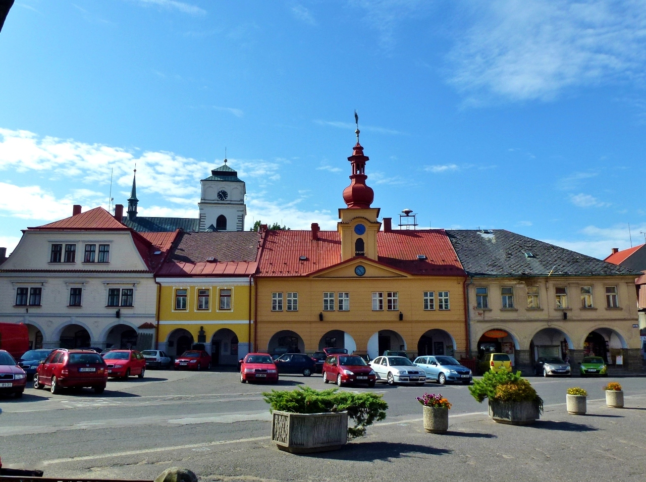 Radnice stará/soud, nám. Míru 5, Sobotka